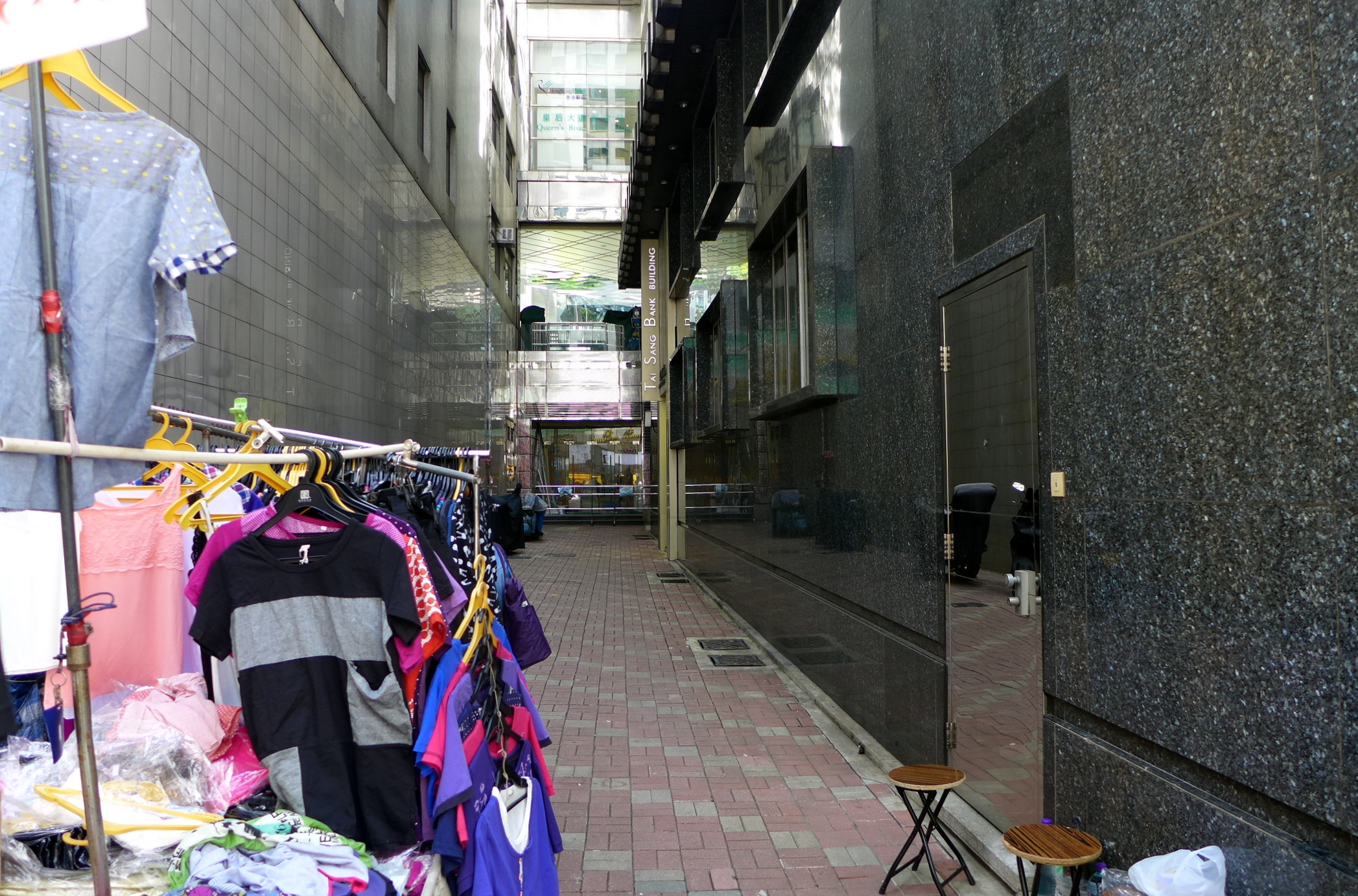 Wing On Street Dead-end part